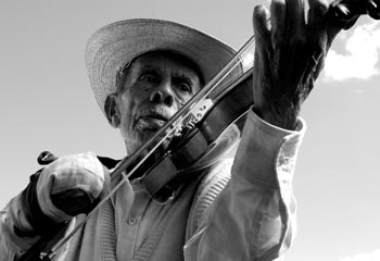 Ángel Tavira músico mexicano y actor principal de la película El violín.